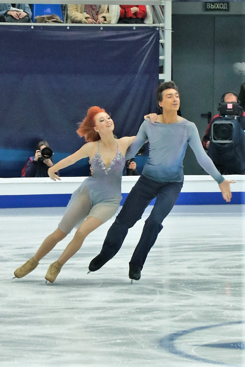 Тиффани Загорски / Джонатан Гурейро (Россия) на Чемпионате Европы по фигурному катанию 2018.